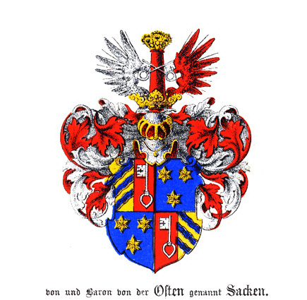 Герб баронів Остен-Сакен